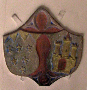 St.-Laurentius-Kirche in Weinheim: Allianzwappen Dalberg und Ulner von Dieburg